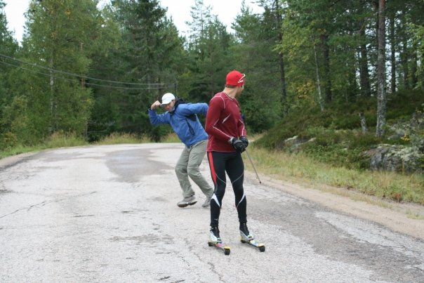 See Title